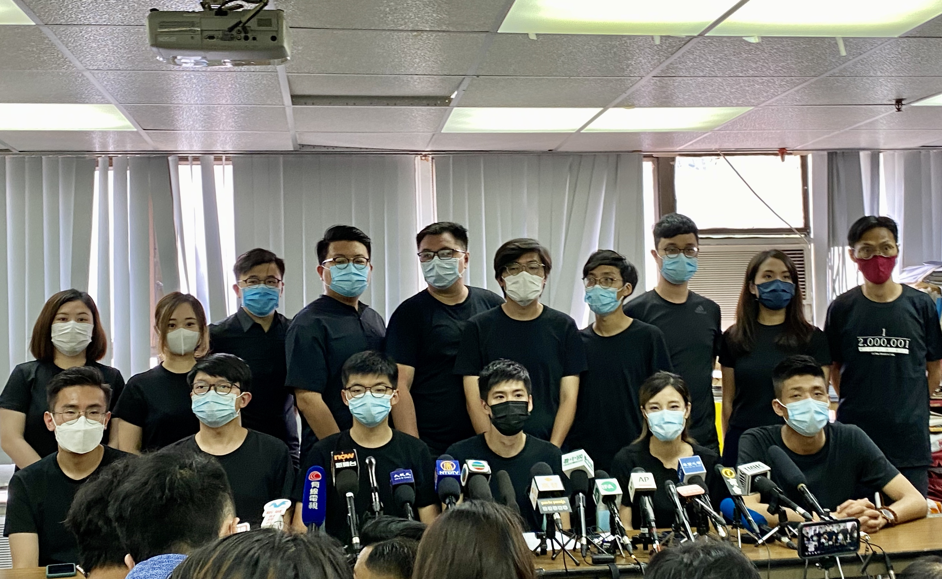 香港抗争派回应立法会初选结果